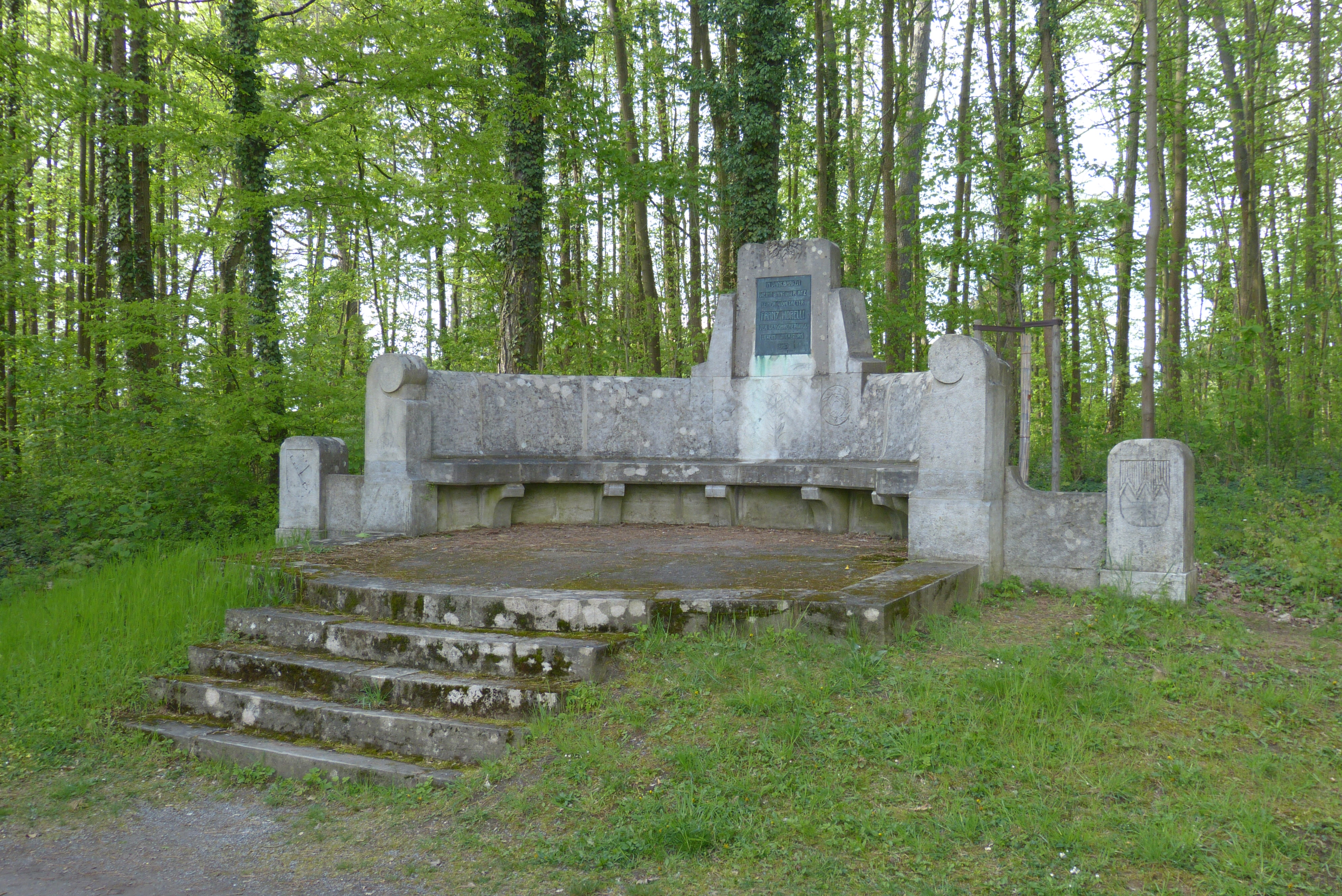 Bismarckwäldchen Würzburg: Ruhebank, Gedenkbank für Franz Morelli, Exedra über Stufenpodest mit Inschrifttafel, Kalkstein und Bronze, Jugendstil, bezeichnet „1907“. This is a photograph of an architectural monument.